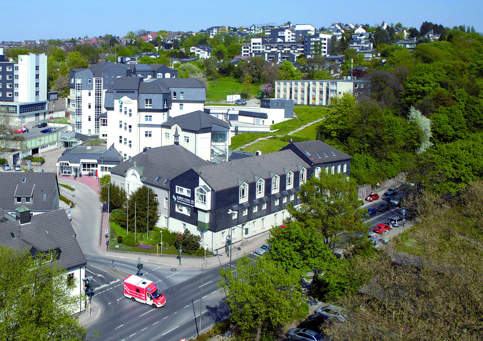 St. Josef Krankenhaus Essen-Werden